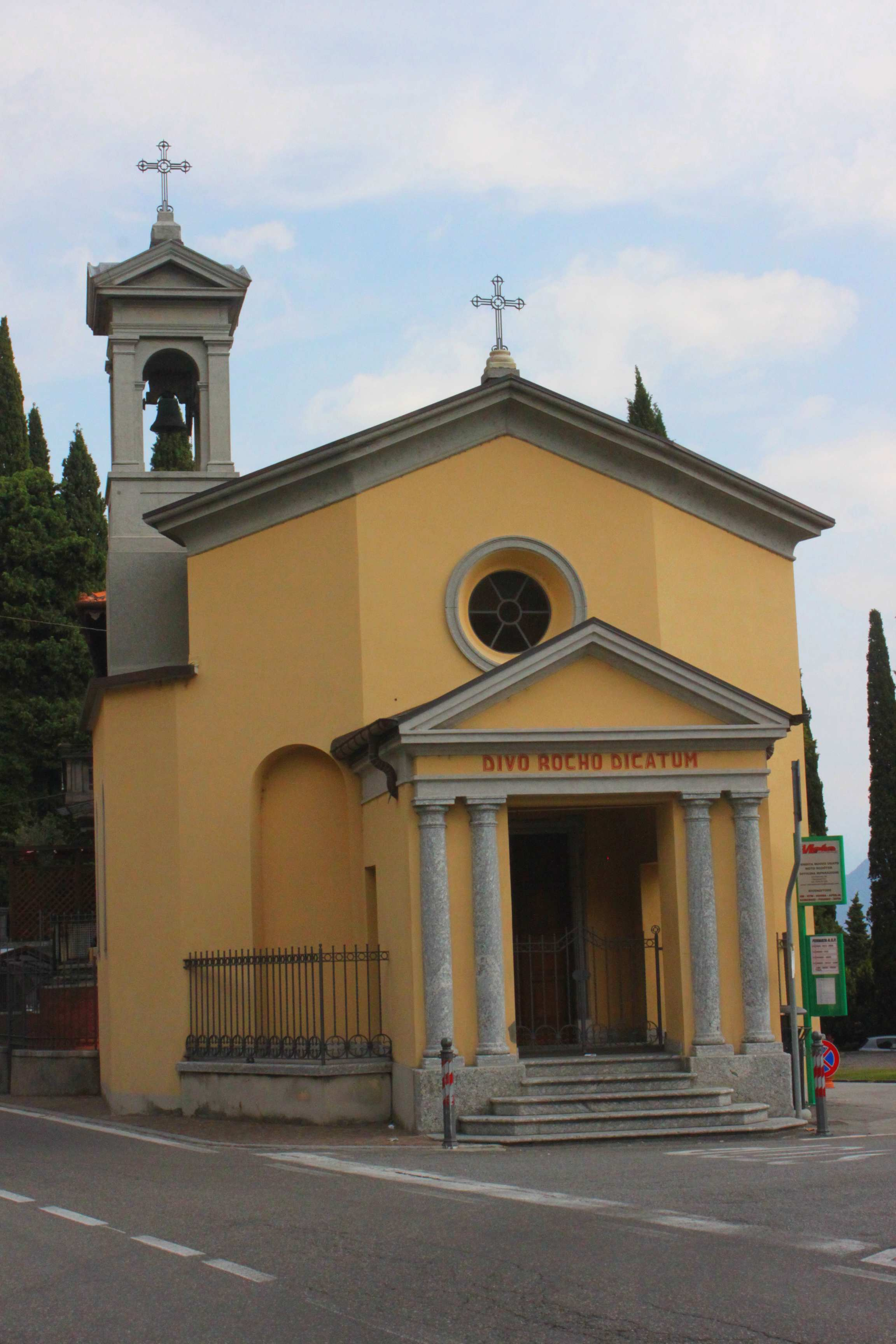 Die Kirche San Rocco am Ende der Via Lusardi wurde 1772 erbaut.